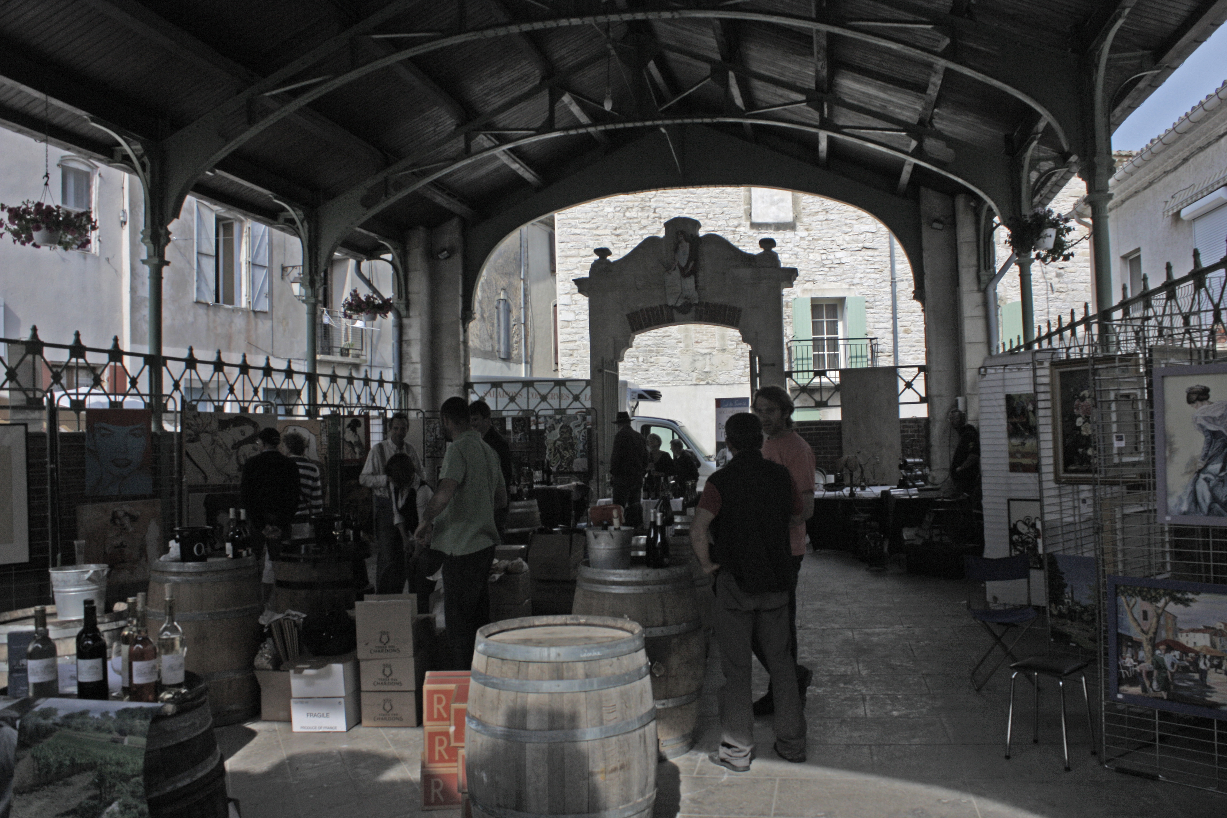 Les halles retrouvent parfois leur vocation, sous l'œil attentif de Marianne.